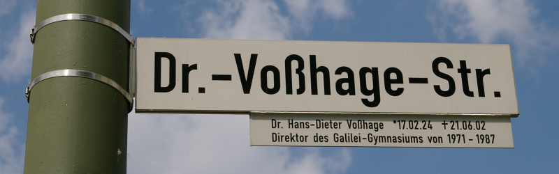 Das Foto zeigt das Straßenschild "Dr.-Voßhage-Straße" in Hamm-Bockum-Hövel.